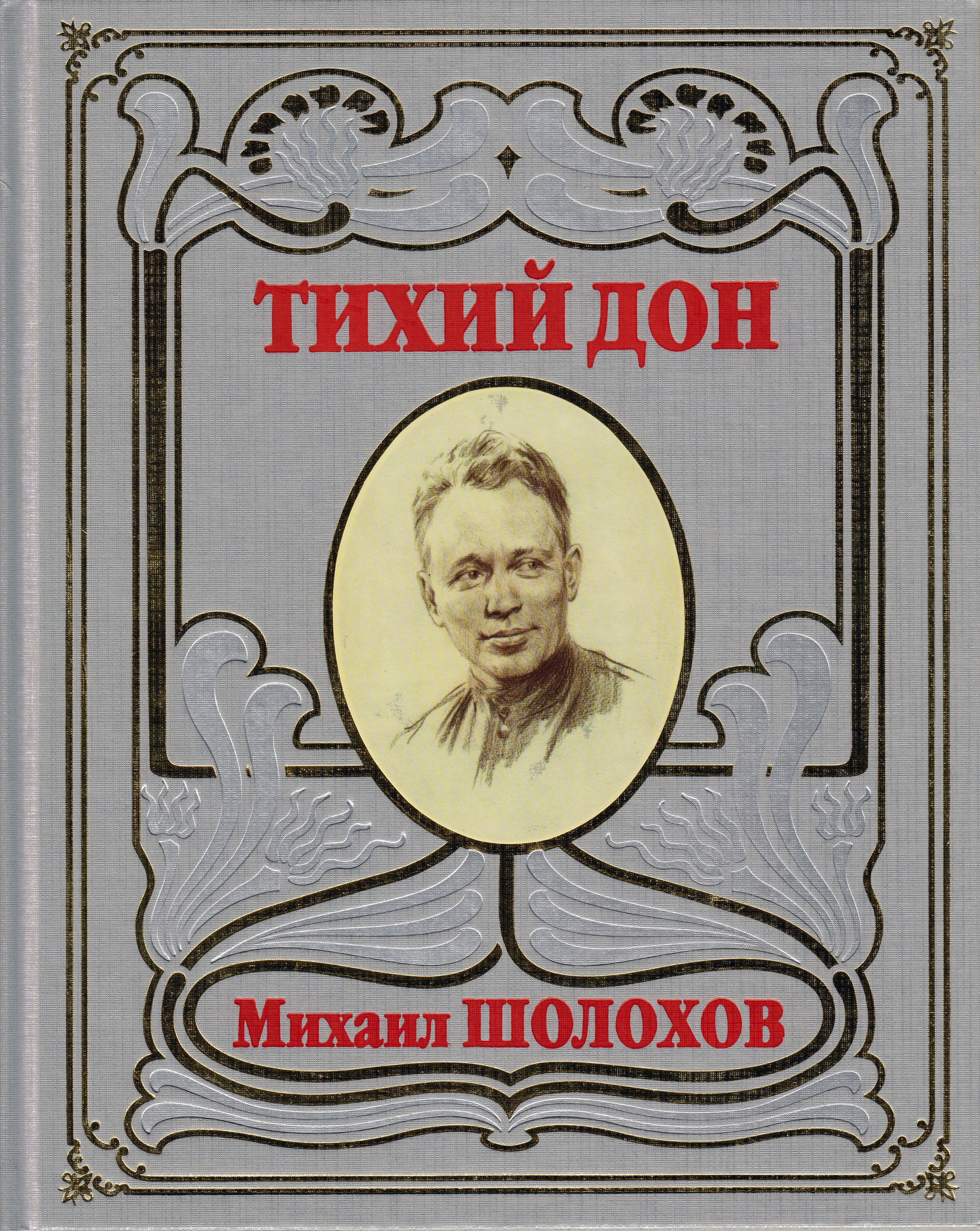 Обложка романа "Тихий Дон" под общей редакцией Александра Федоровича Стручкова и Светланы Михайловны Шолоховой